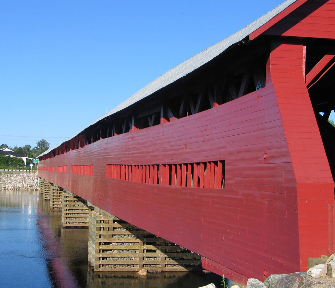 Extérieur du Pont Marchand de Fort-Coulonge, Québec, Canada